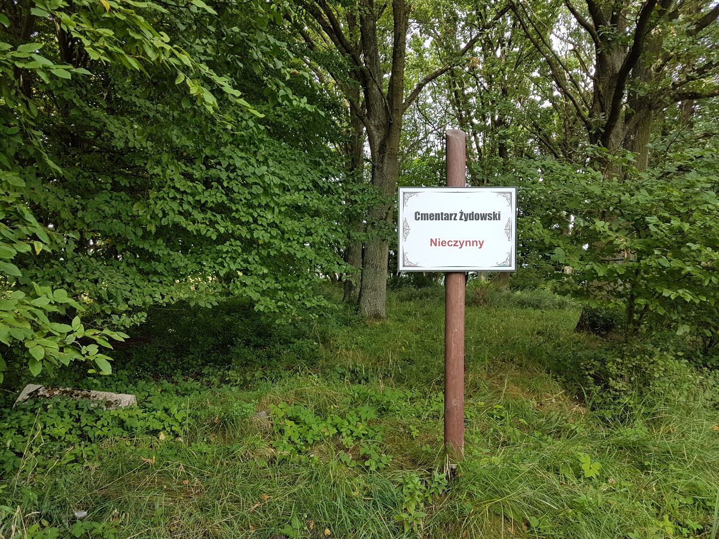 Nieczynny Cmentarz Żydowski w Połczynie Zdroju.